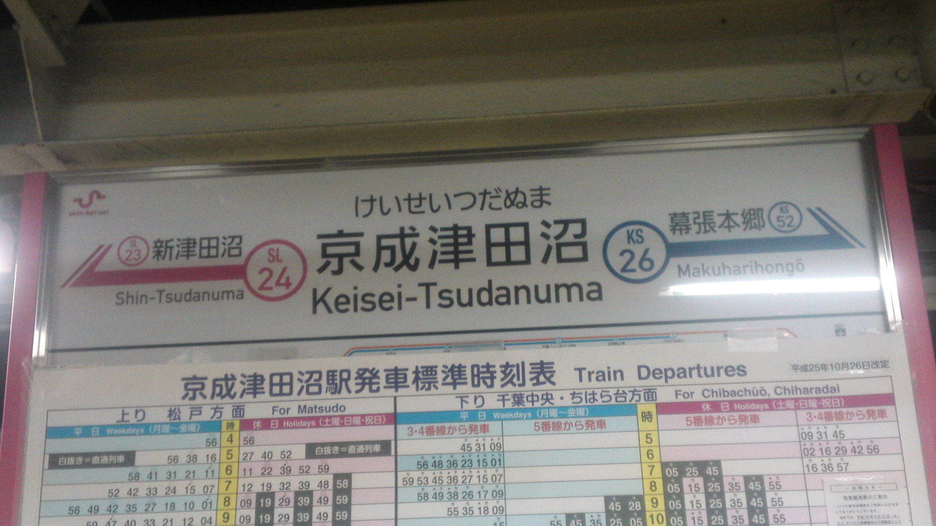 京成津田沼駅5番線の新京成電鉄新京成線の駅名標。新京成線と京成千葉線の駅番号が両方表記されている。路線に応じて色分けがなされた新しい（2014年11月3日設置）もの。